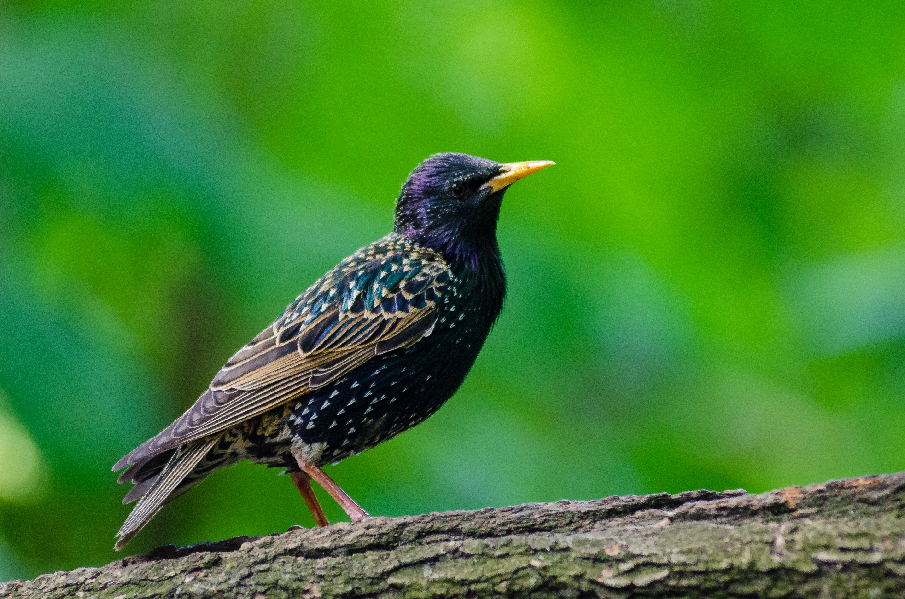 bird